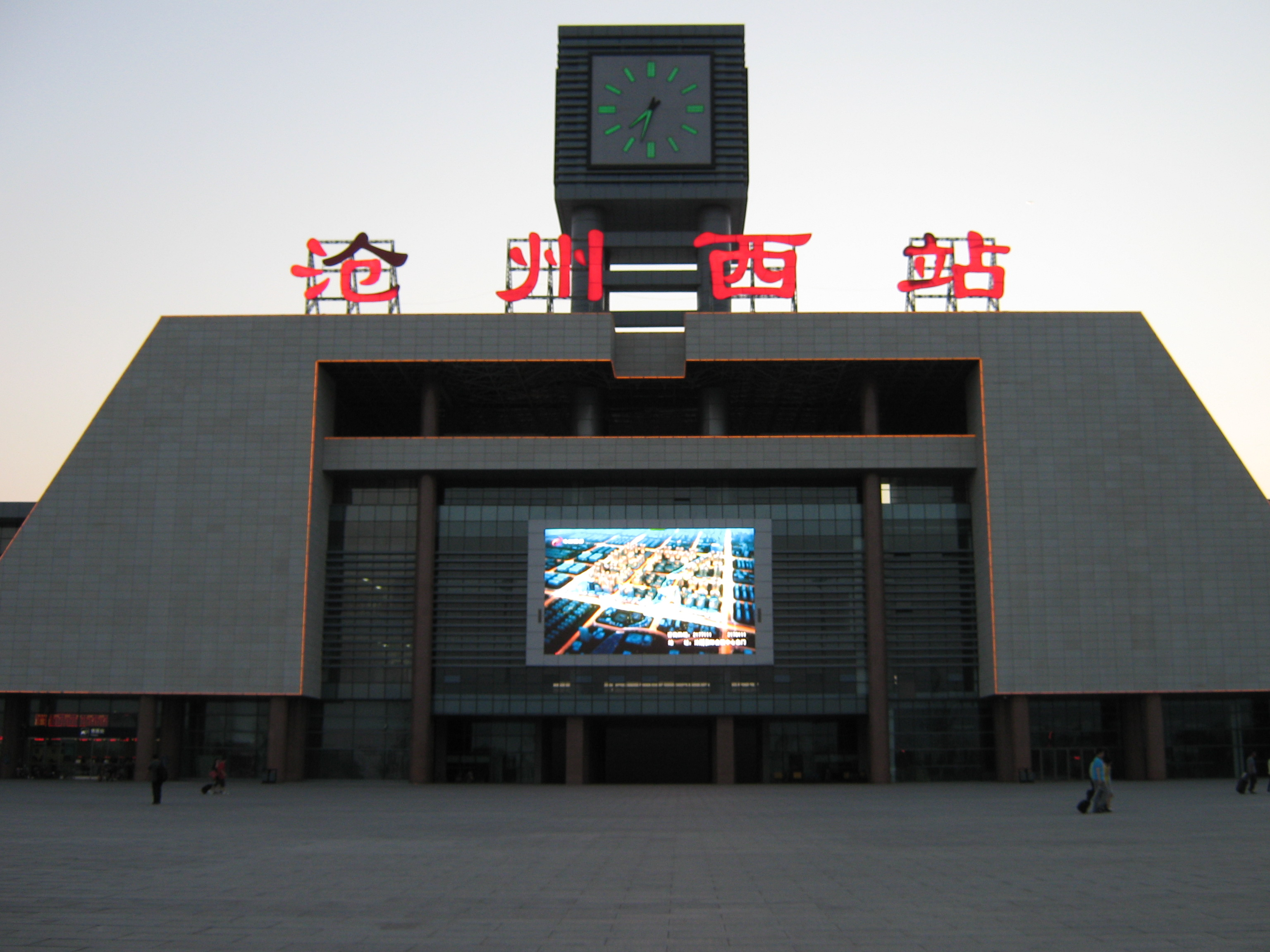 沧州西火车站